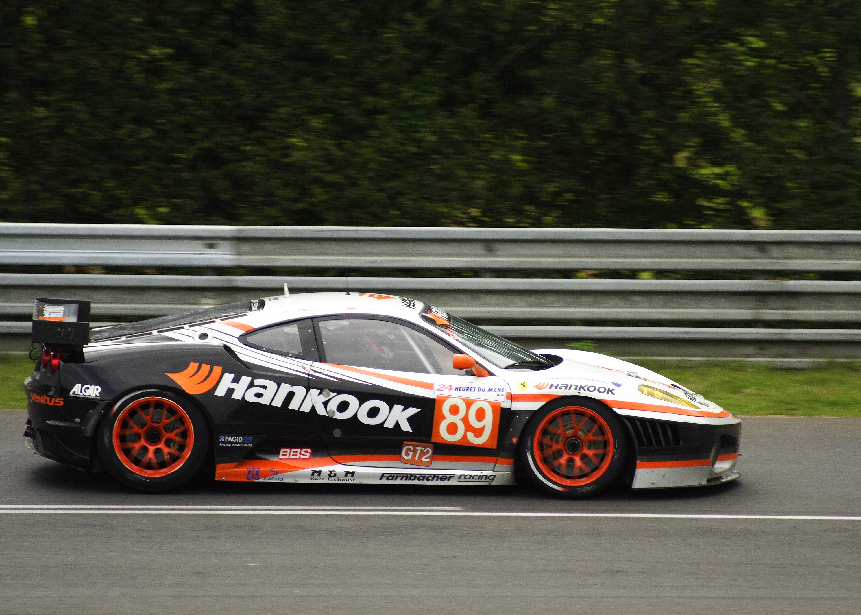 Le Mans 24 Hour Race 2010